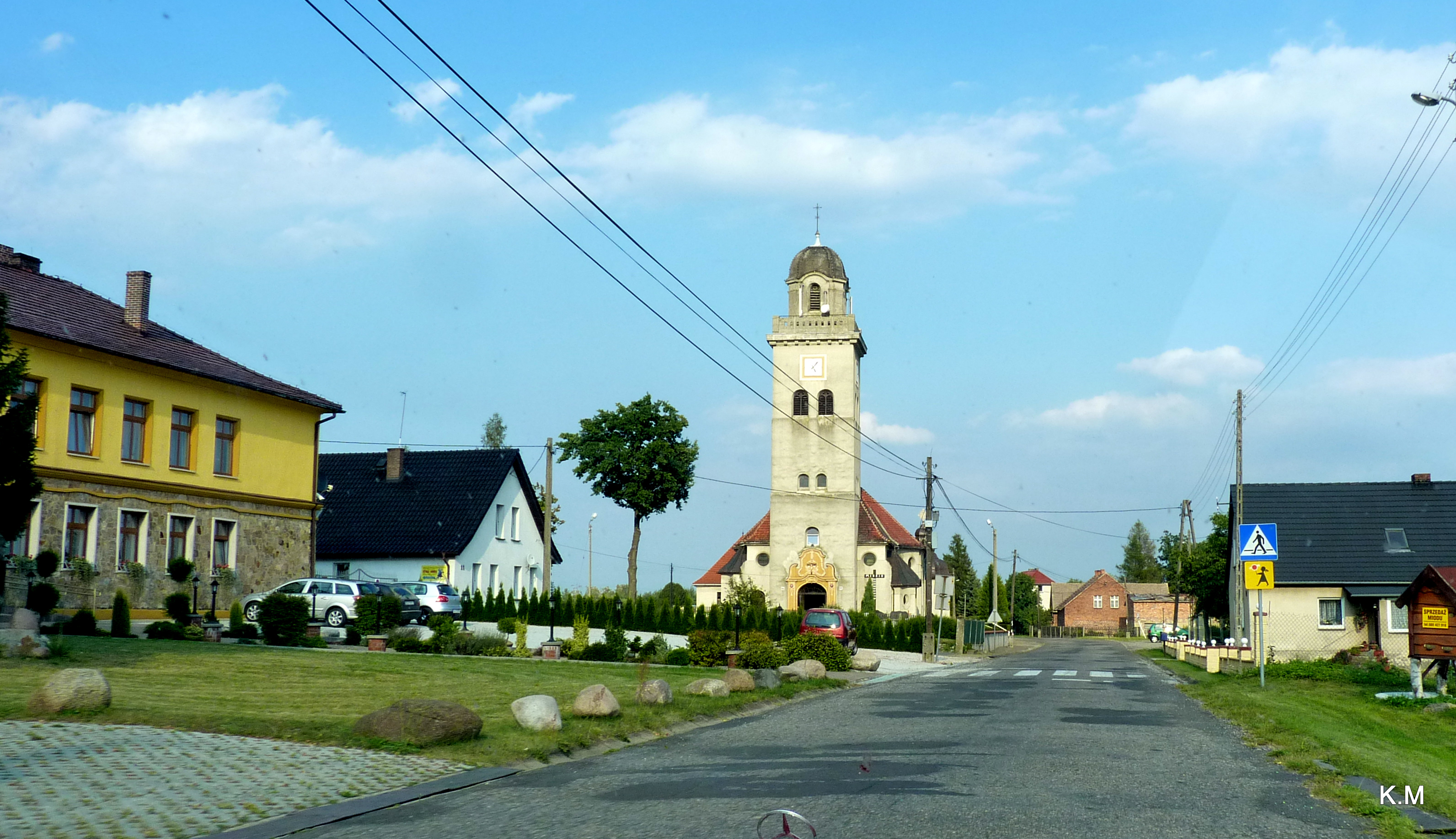 Łomnica - kościół pw. Nawiedzenia NMP